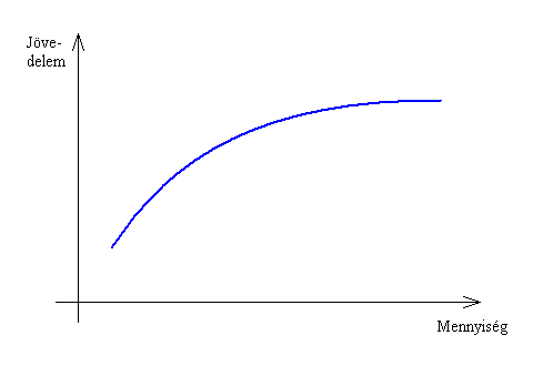 Normál jószág (illusztráció a Fogyasztáselmélet (mikroökonómia) cikkhez)